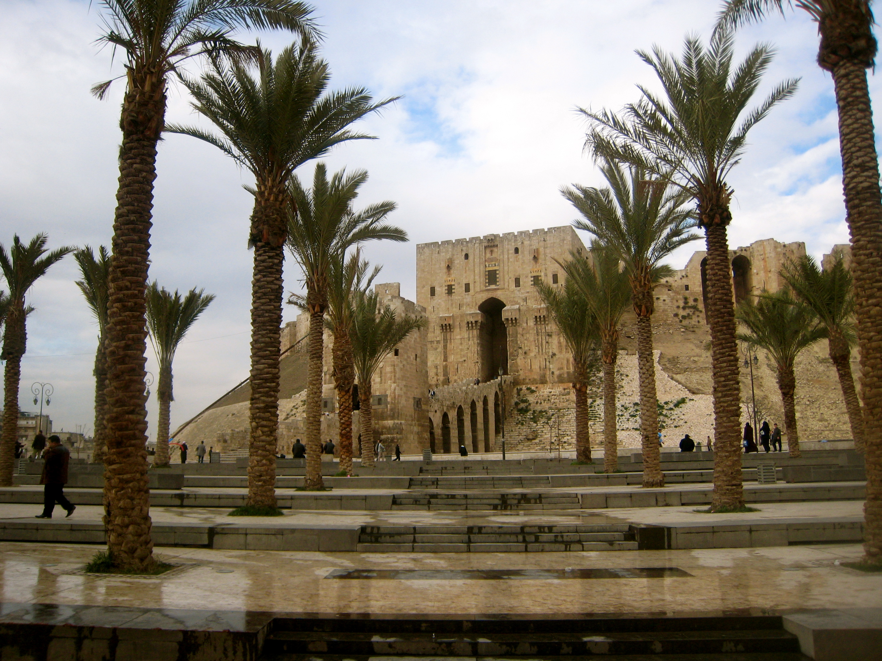 Aleppo Citadel